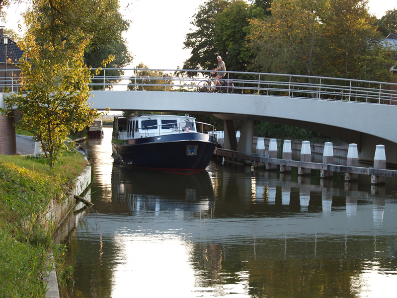 Hausboot Typ Simmerskip v. Yachtcharter Leeuwarden. Brückendurchfahrt Scharnegoutum, Sneekertrekvaart Friesland